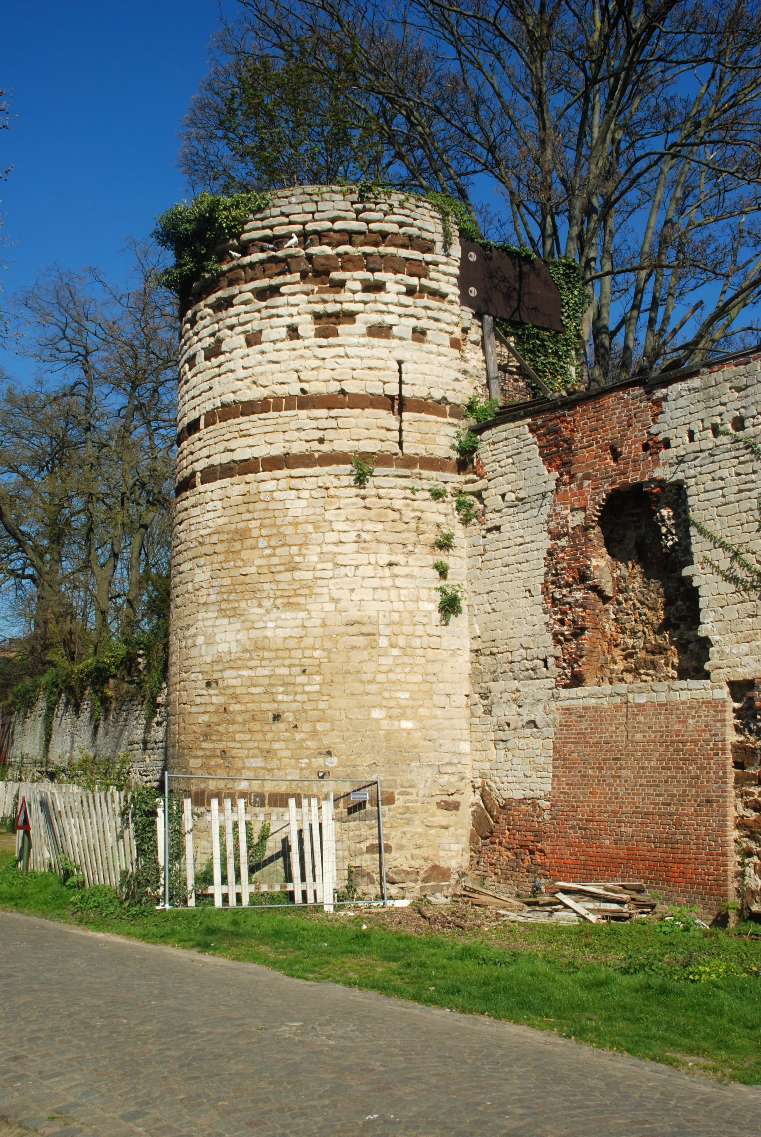 Belgique - Brabant flamand - Louvain - Première enceinte de Louvain - Handbooghof